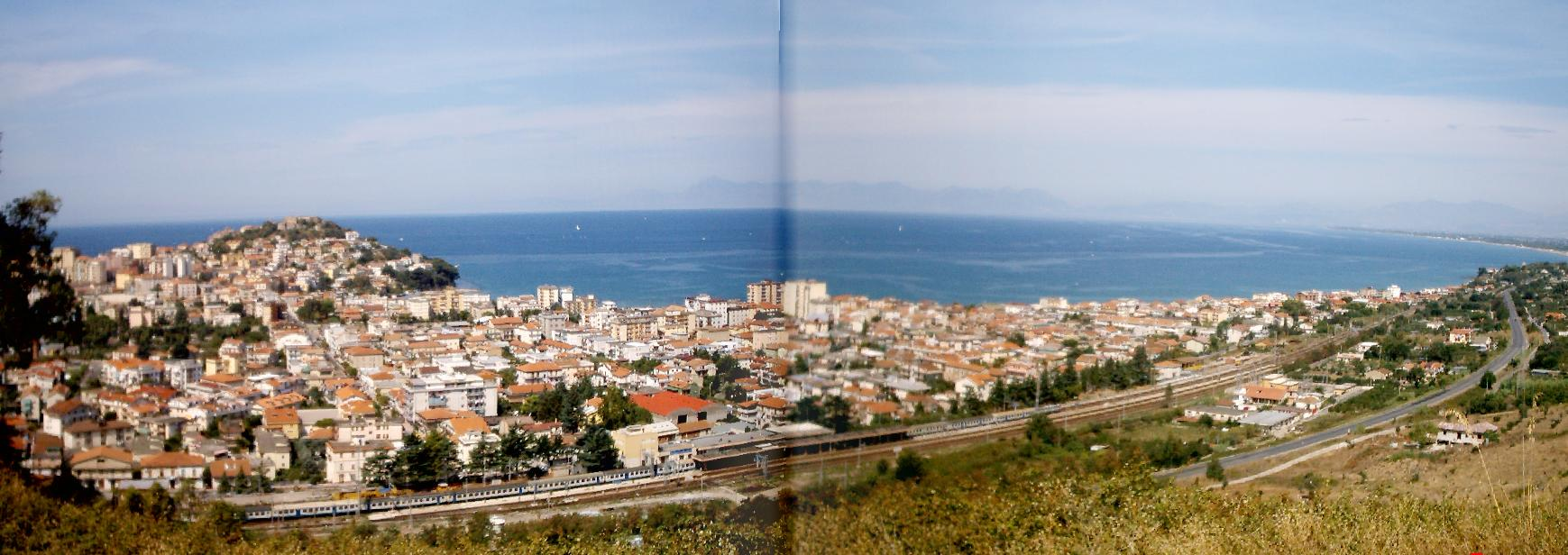 Agropoli, la città